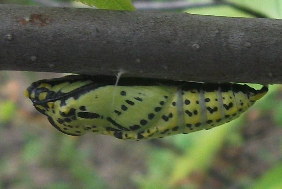 Aporia crataegi